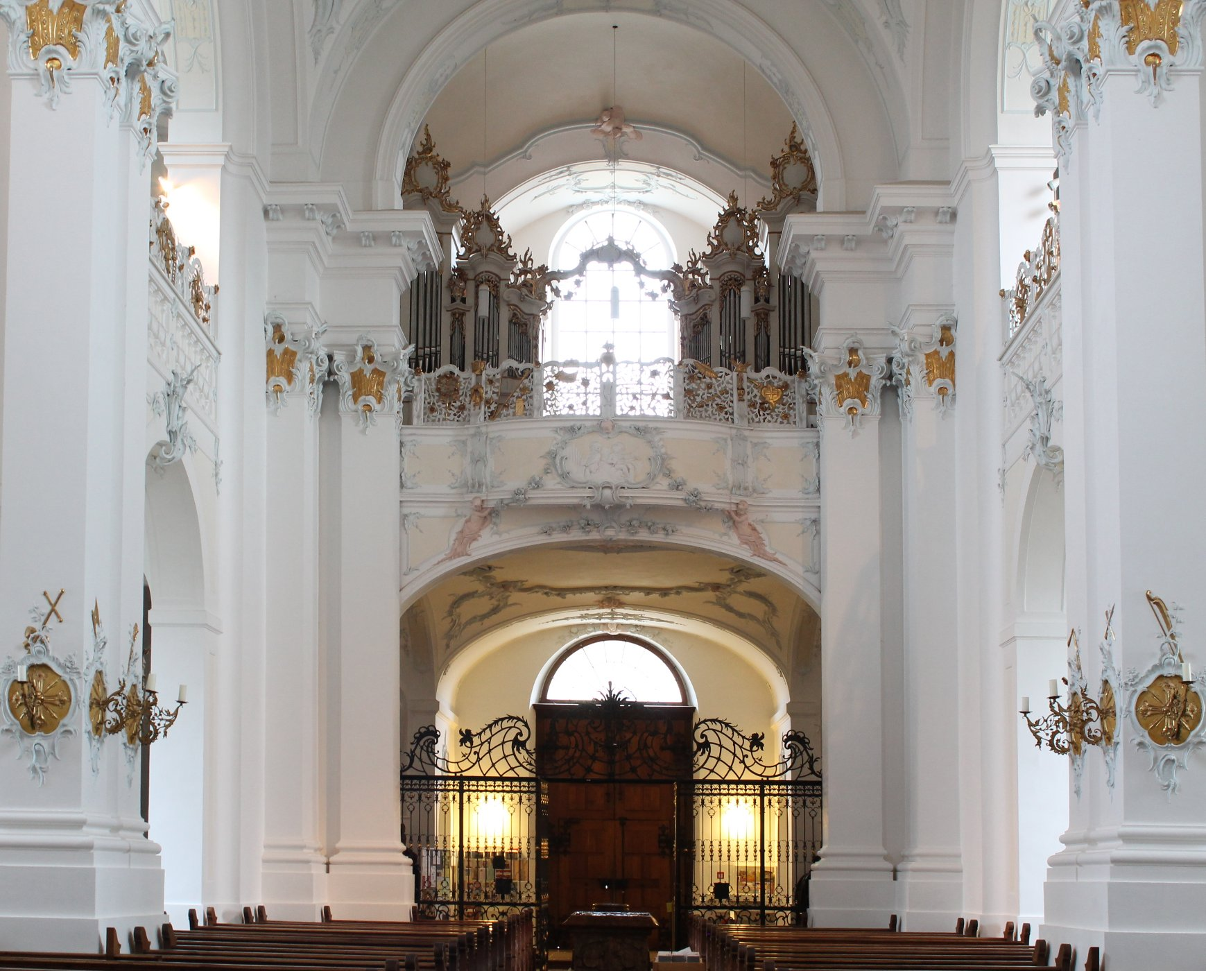 Orgel des Klosters Rott (2012, Johannes Führer, II/30; Prospekt von 1765)